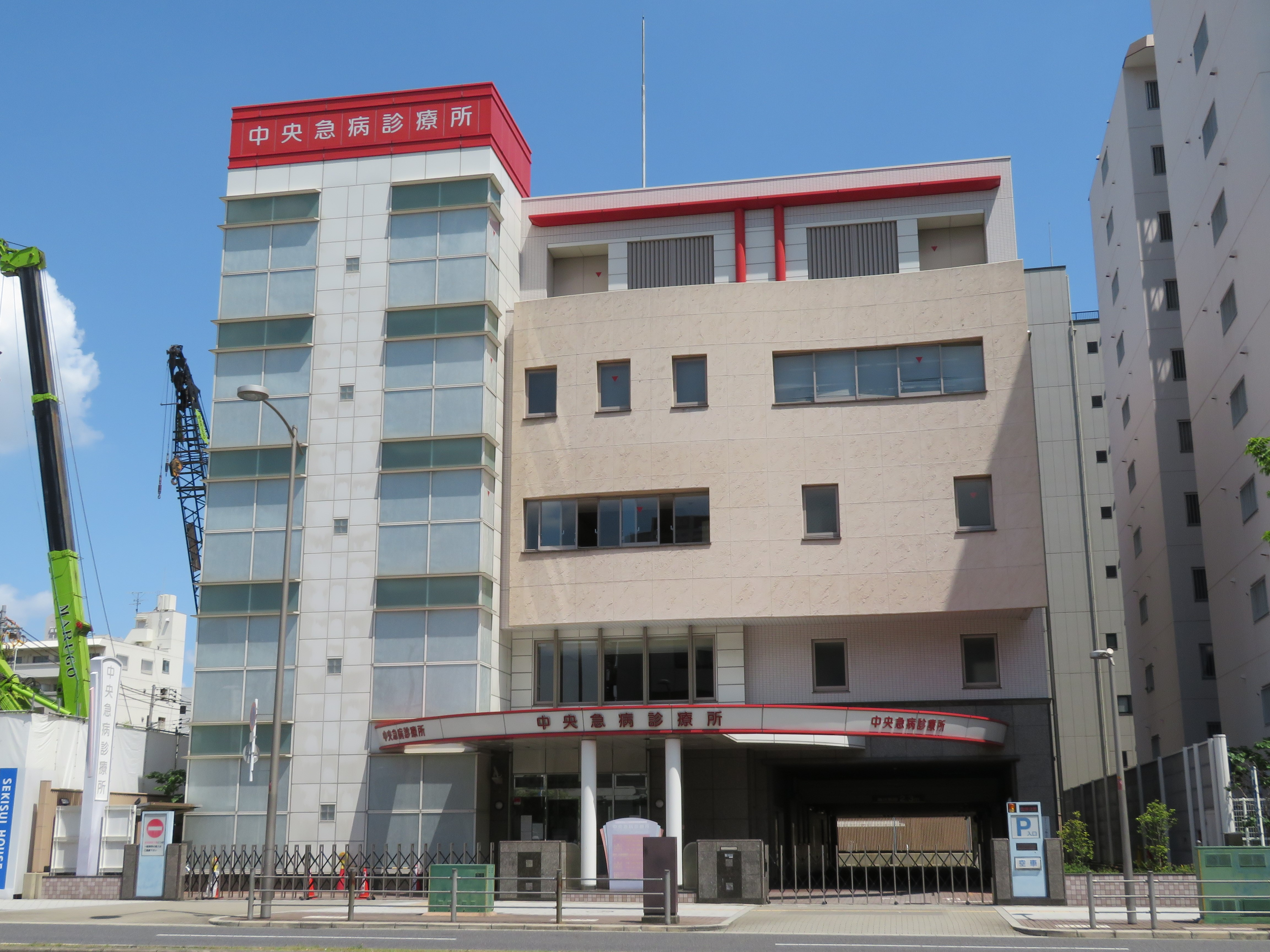 中央急病診療所